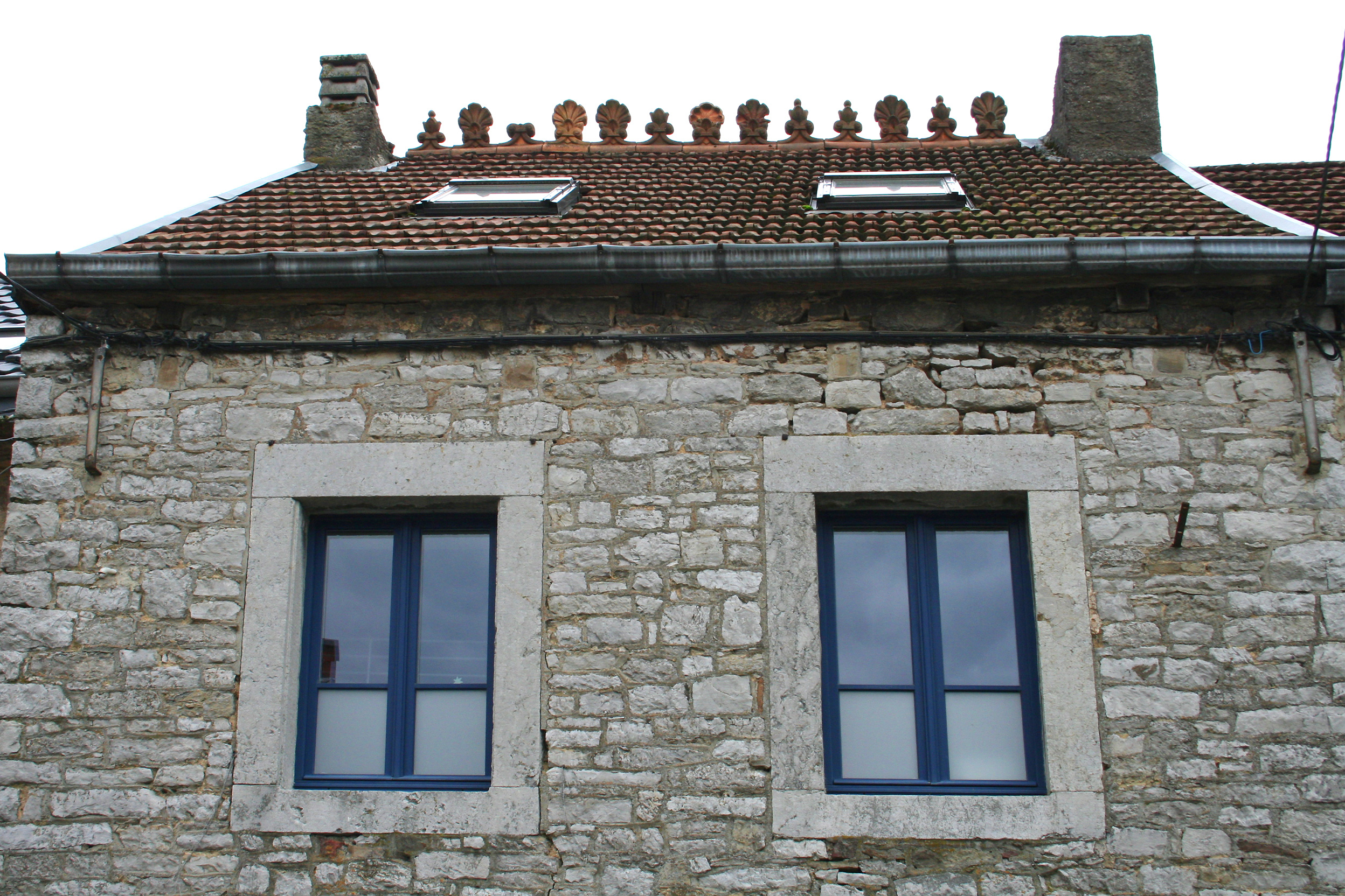 Tuiles faitières à motifs décoratifs couvrant le faîtage de la toiture d'une maison à Deigné (Belgique).